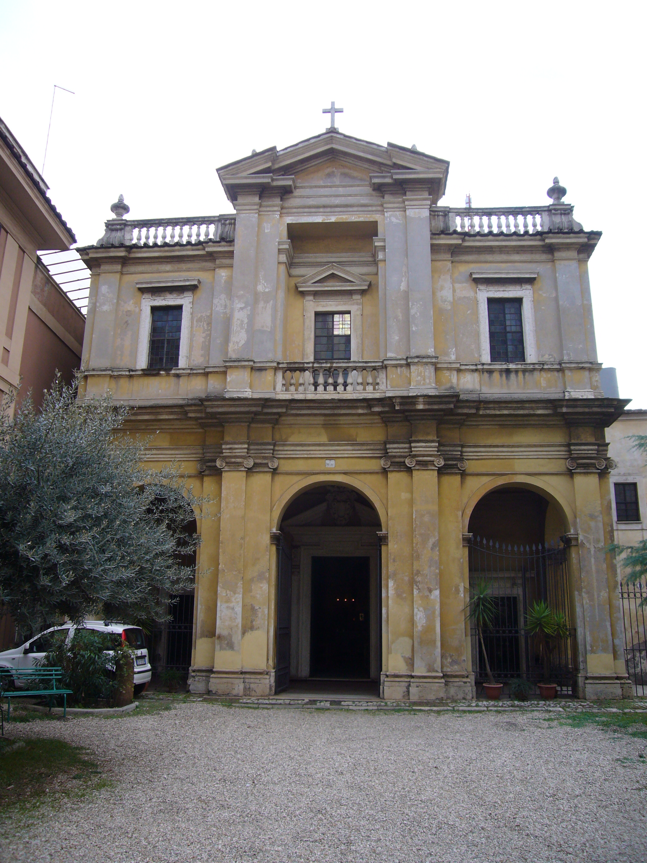 Roma , santa Bibiana (Esquilino) Licensing